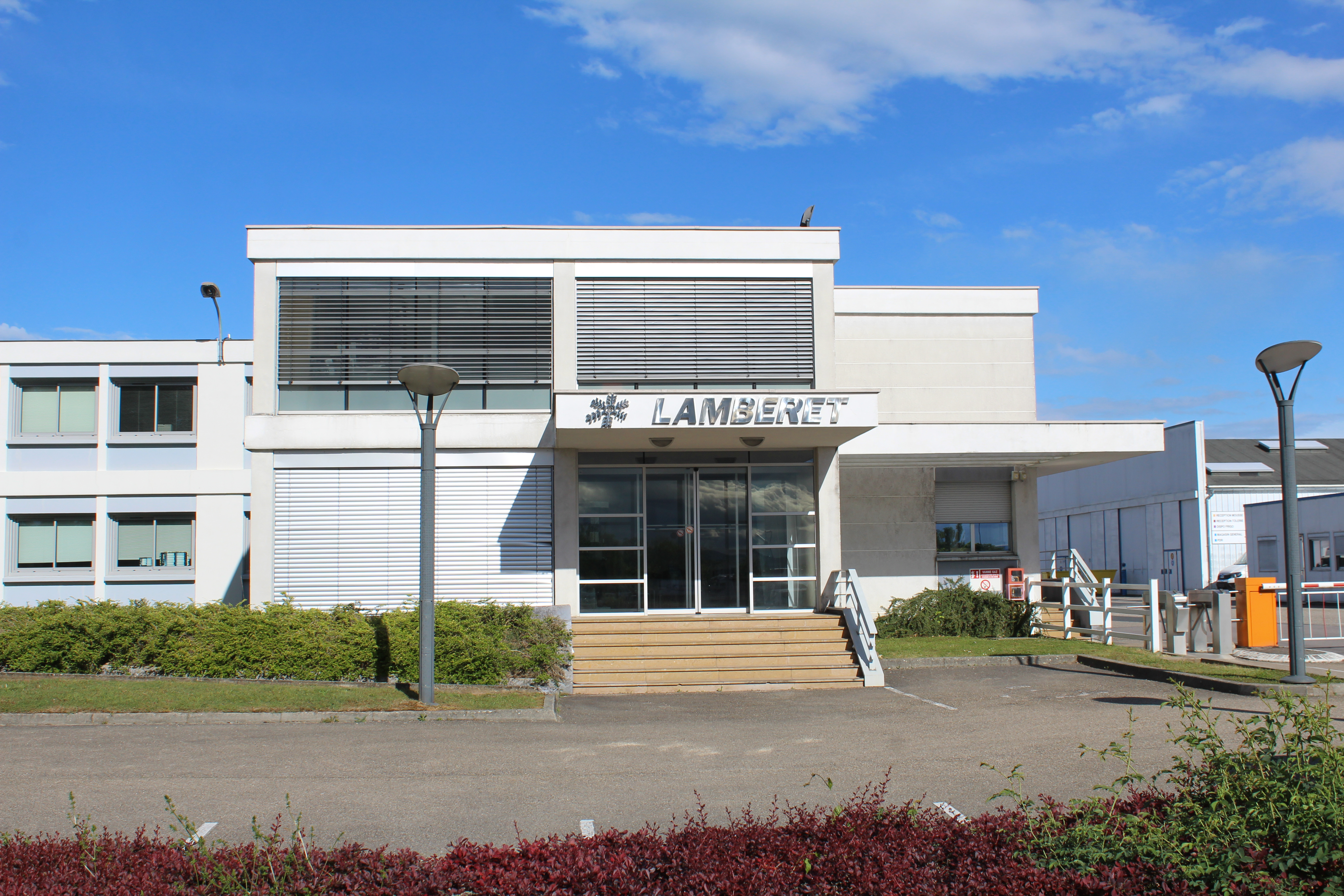 L'entreprise Lamberet, Saint-Cyr-sur-Menthon.